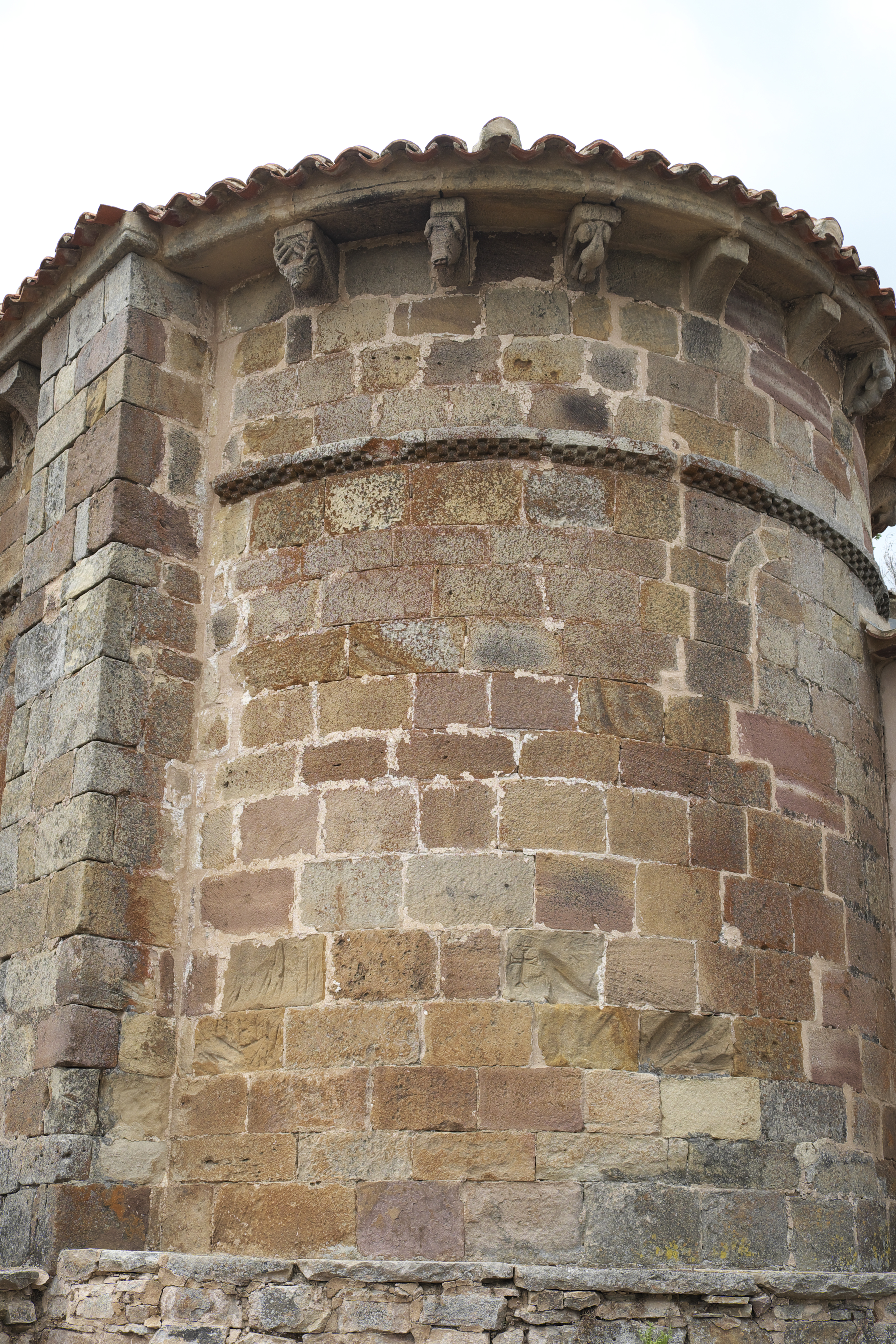 Katholische Kirche San Martín in San Martín de Hoyos, einem Ortsteil von Valdeolea (Kantabrien/Spanien), romanische Apsis mit Kragsteinen